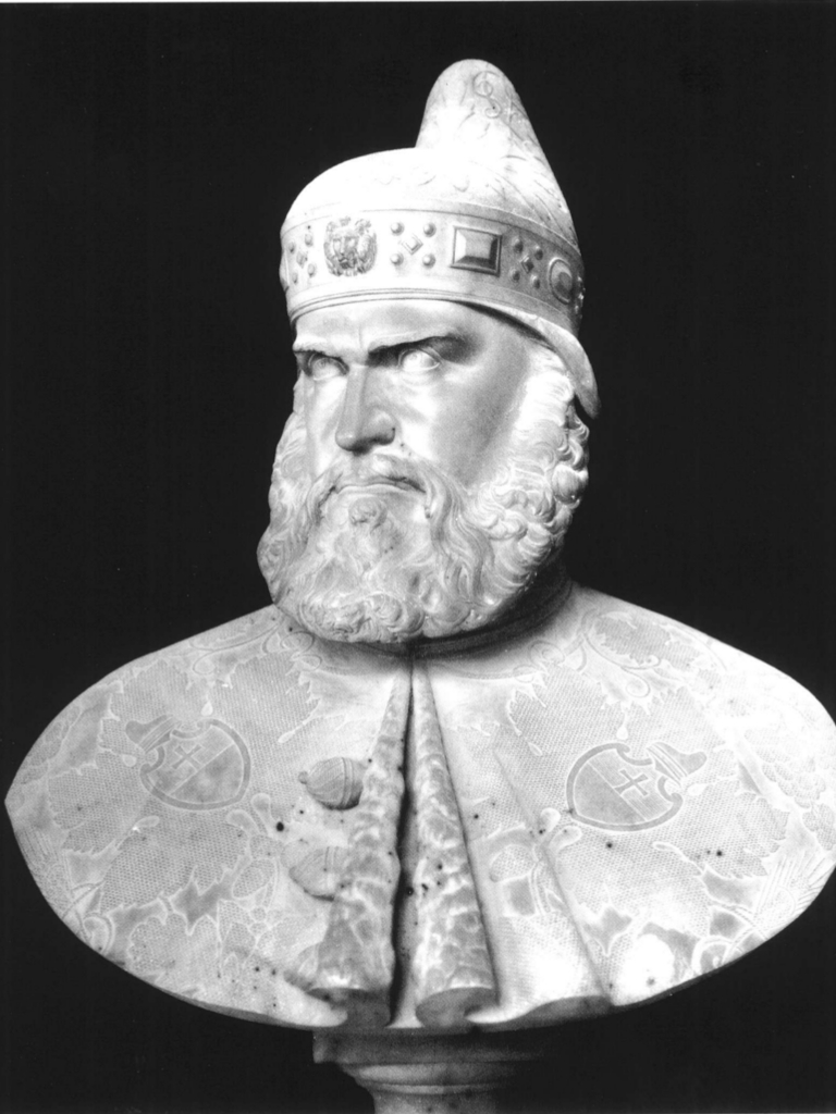 Andrea Gritti, opera di Luigi Borro del 1860. Il busto fa parte del Panteon Veneto, conservato presso Palazzo Loredan di Campo Santo Stefano a Venezia.